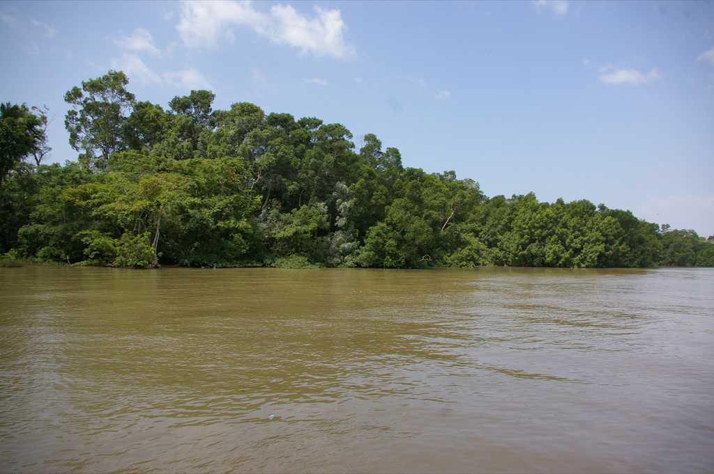 Ilha de Marajó